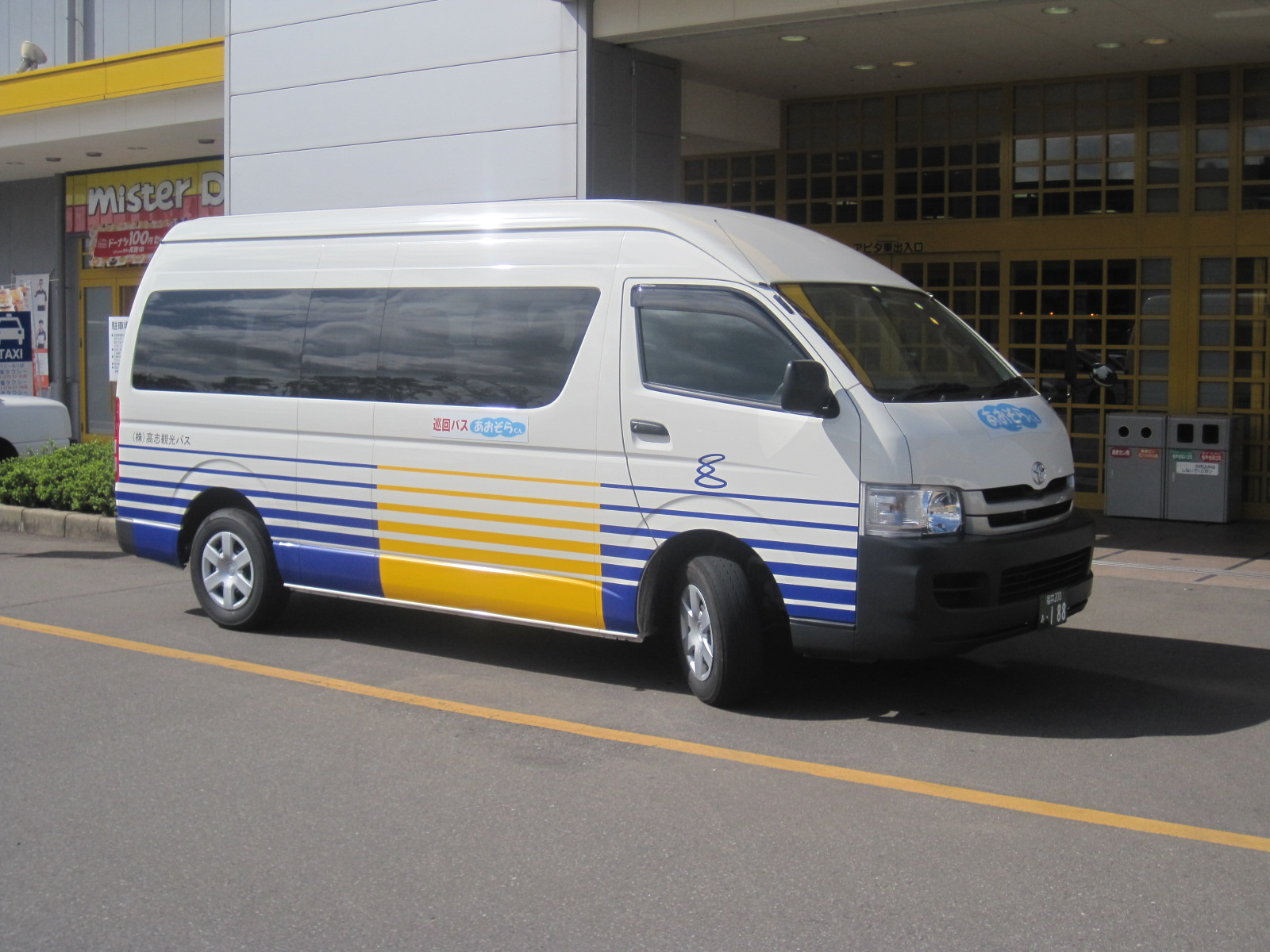 えちぜん鉄道が運行主体となっている地域巡回バスあおぞらくん。